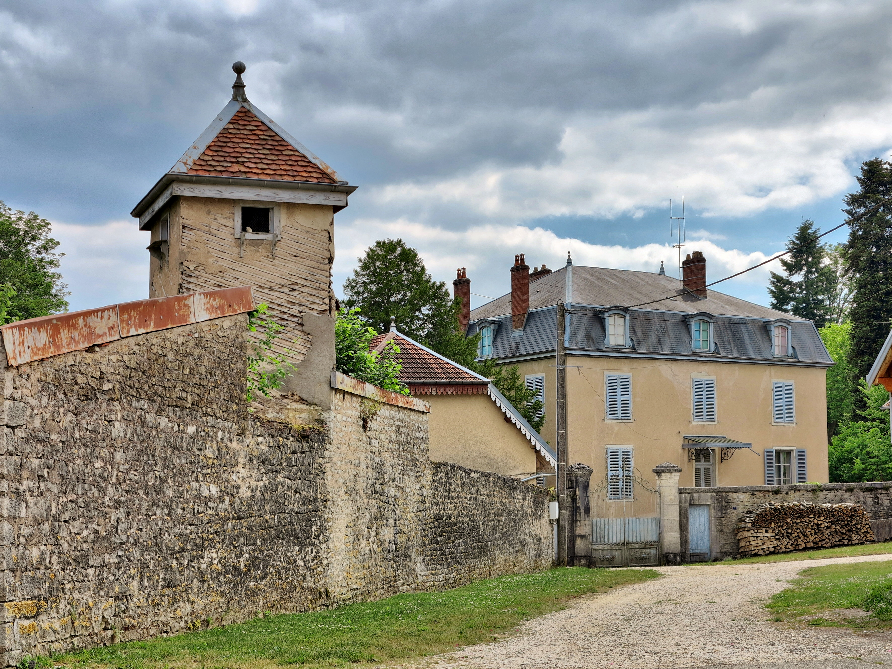 Le château et son pigeonnier